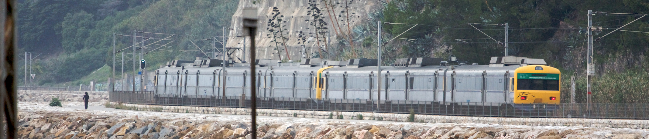 Tipo: Comboio Urbano 19723 [Cais do Sodré - Oeiras] Local: Cruz Quebrada [Linha de Cascais, PK 10] Data e hora: 13 de Novembro de 2009 [17h05] Material: Automotoras 3270 e 3154 [Unidade Quádrupla Eléctrica + Unidade Tripla Eléctrica]